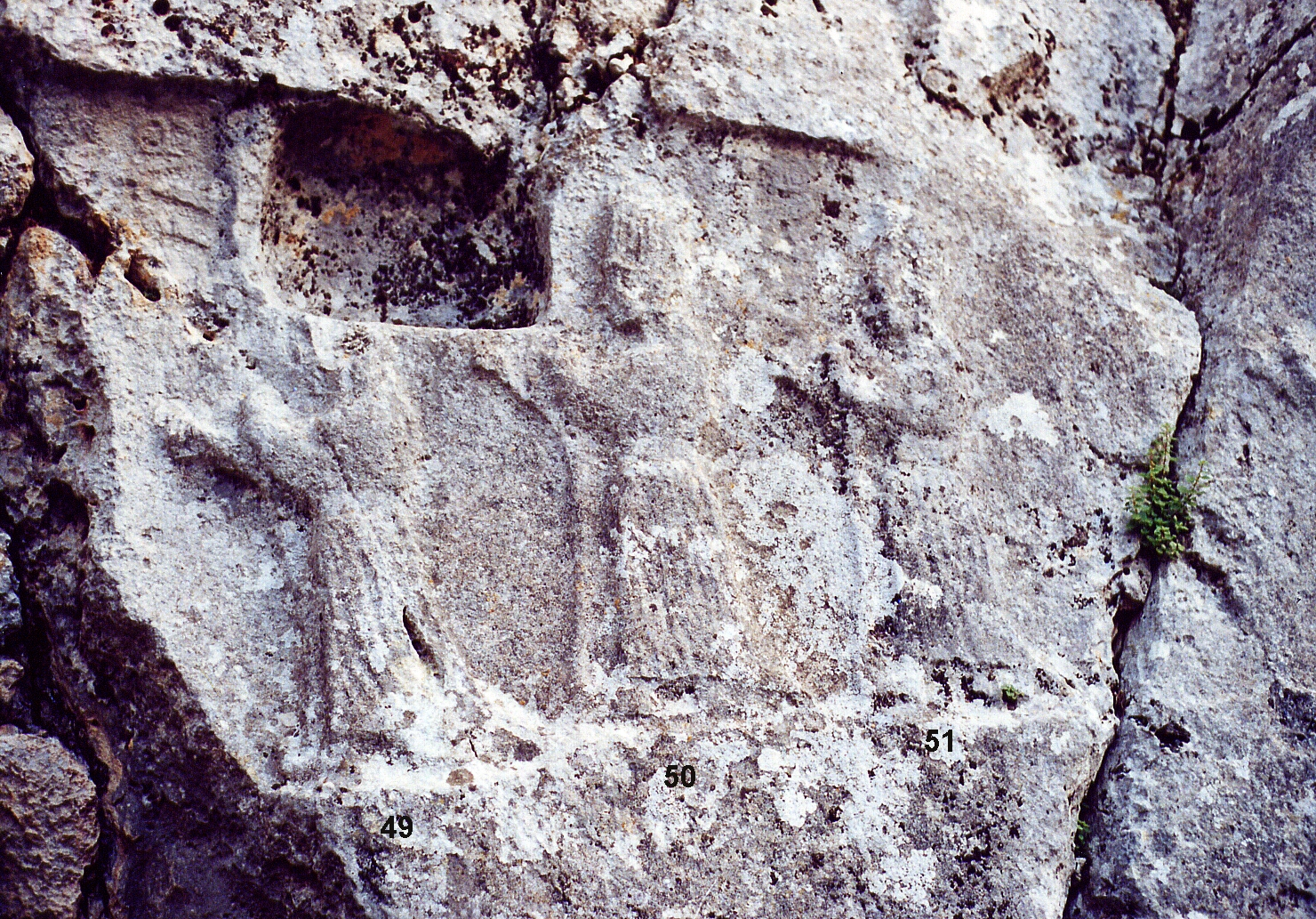 Yazılıkaya Reliefs 49-51